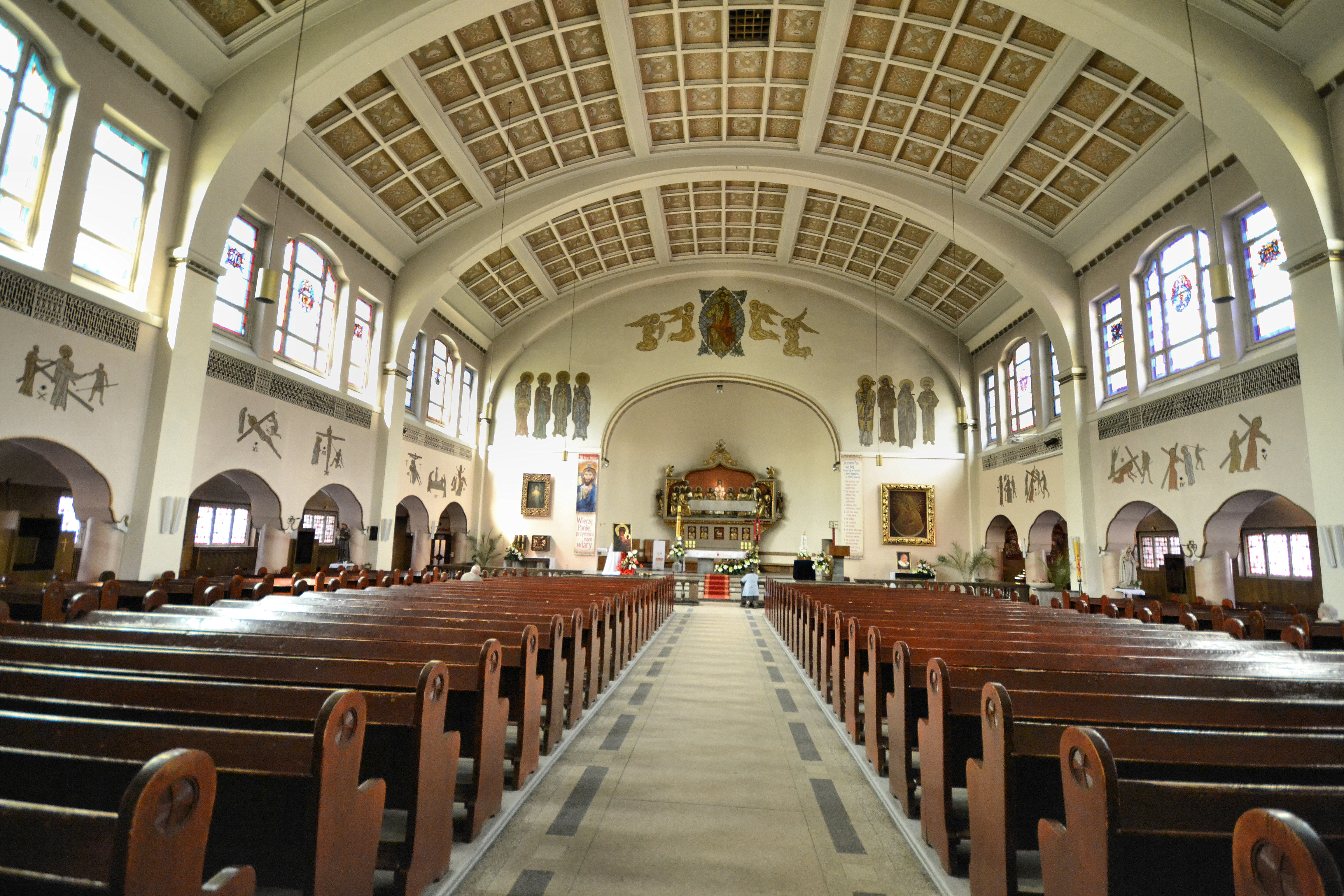 Kościół NSPJ w Szczecinie.